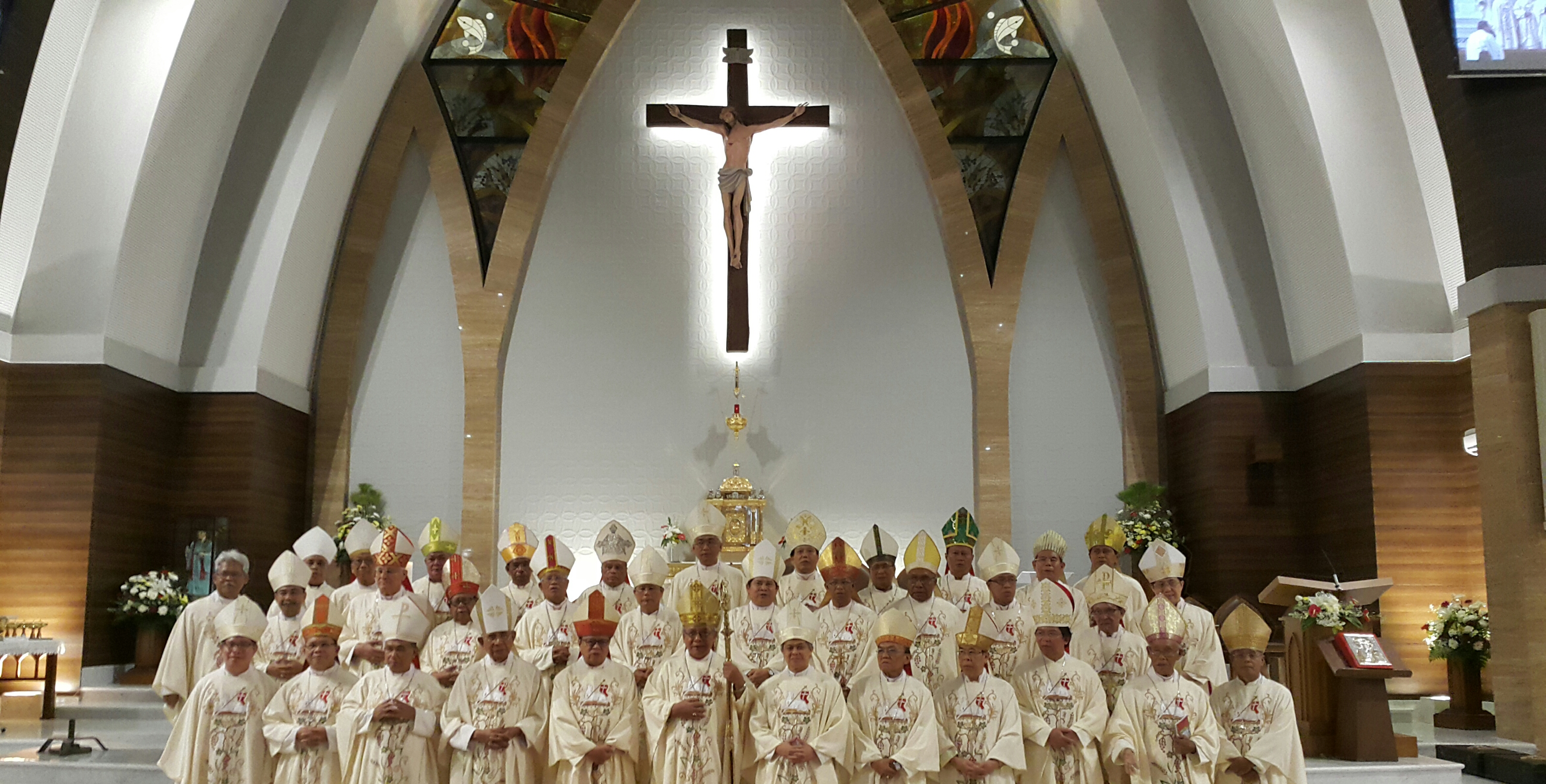 Penutupan Sidang KWI 2017